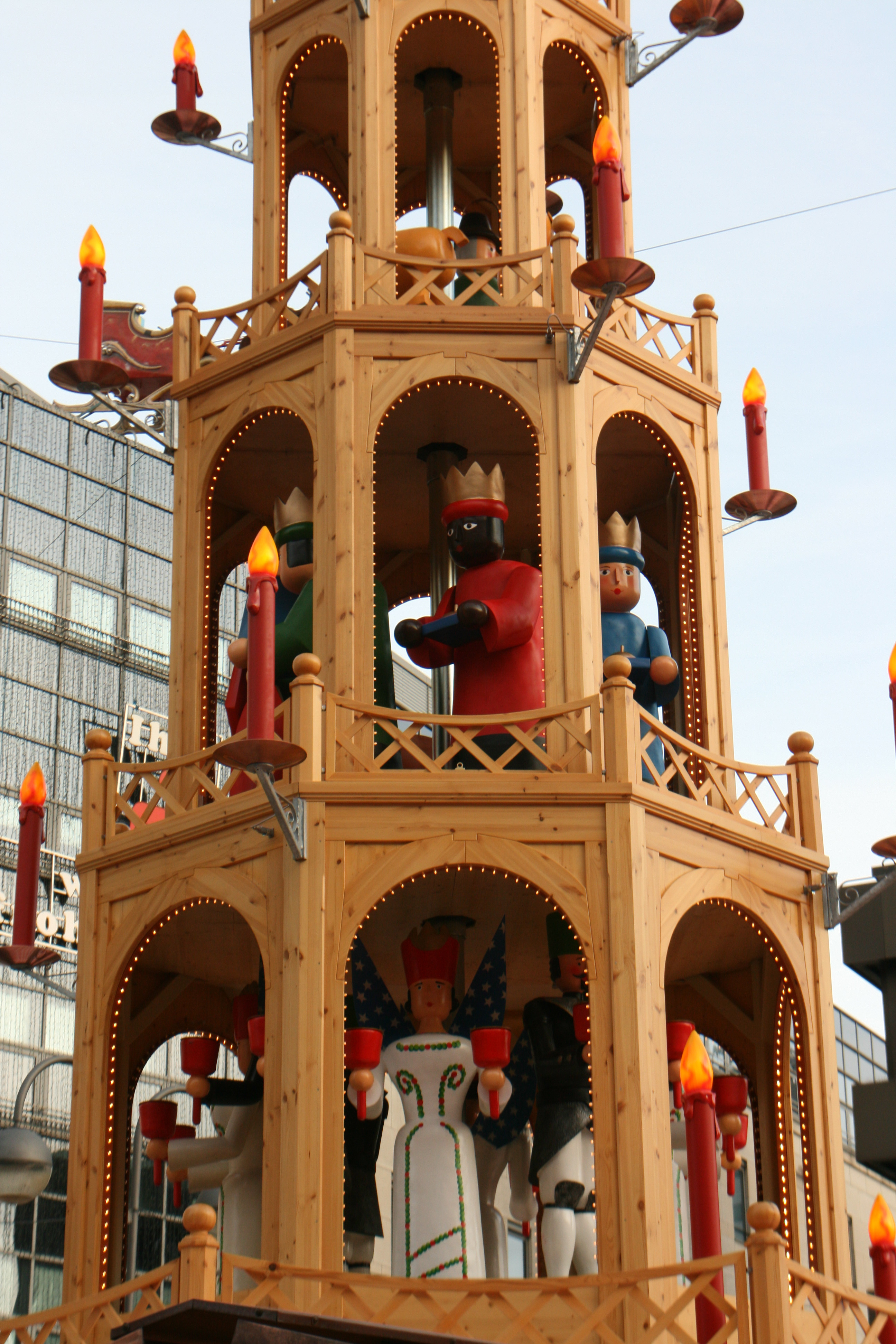 Bochumer Weihnachtsmarkt 2011, Dr.-Ruer-Platz in Bochum